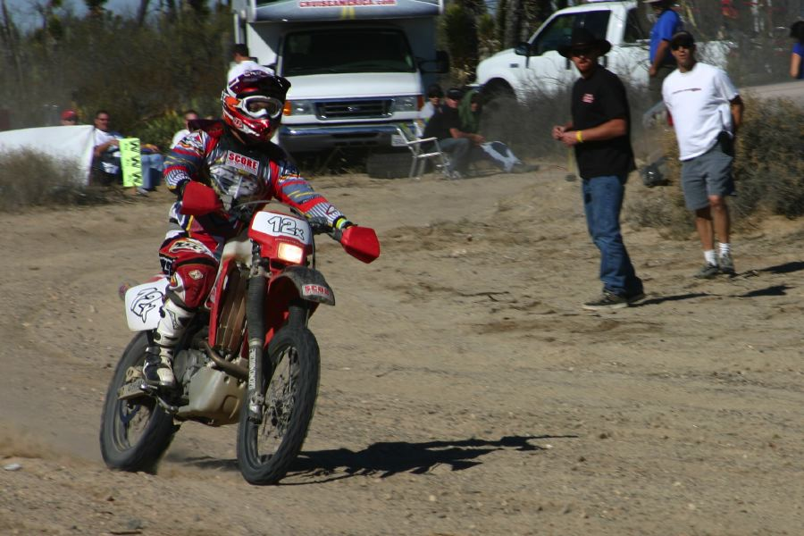 Corredor en la milla 328 de la Baja 1000 Photo by Robert Stokstad, 2004. Taken in El Crucero, at mile 328 of the Baja 1000.